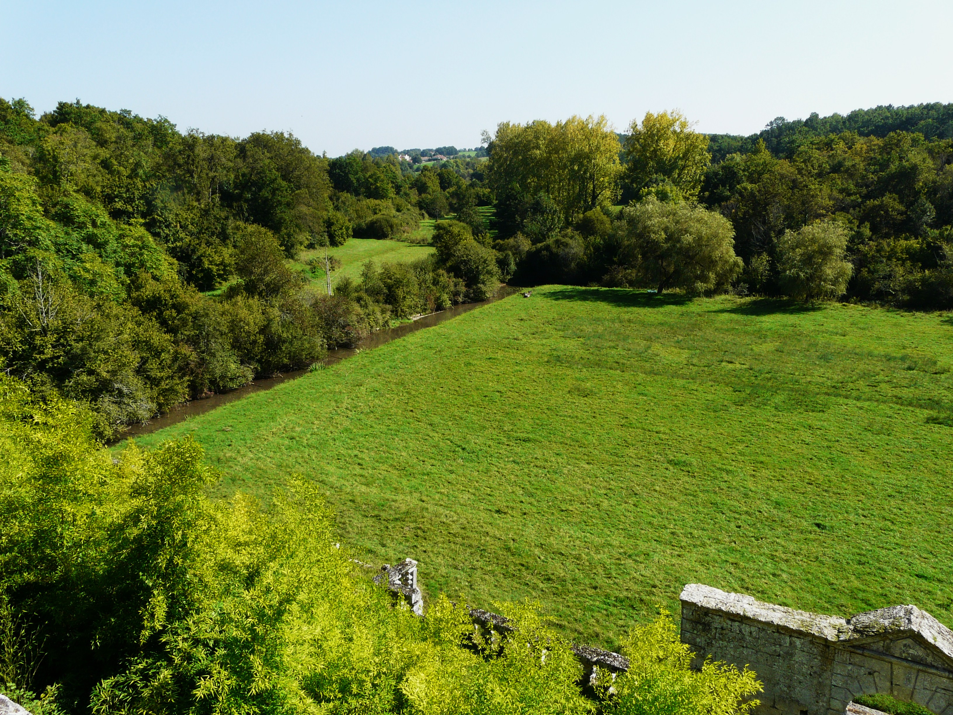 Le parc du château des Bernardières délimité par la Nizonne, Champeaux-et-la-Chapelle-Pömmier, Dordogne, France.